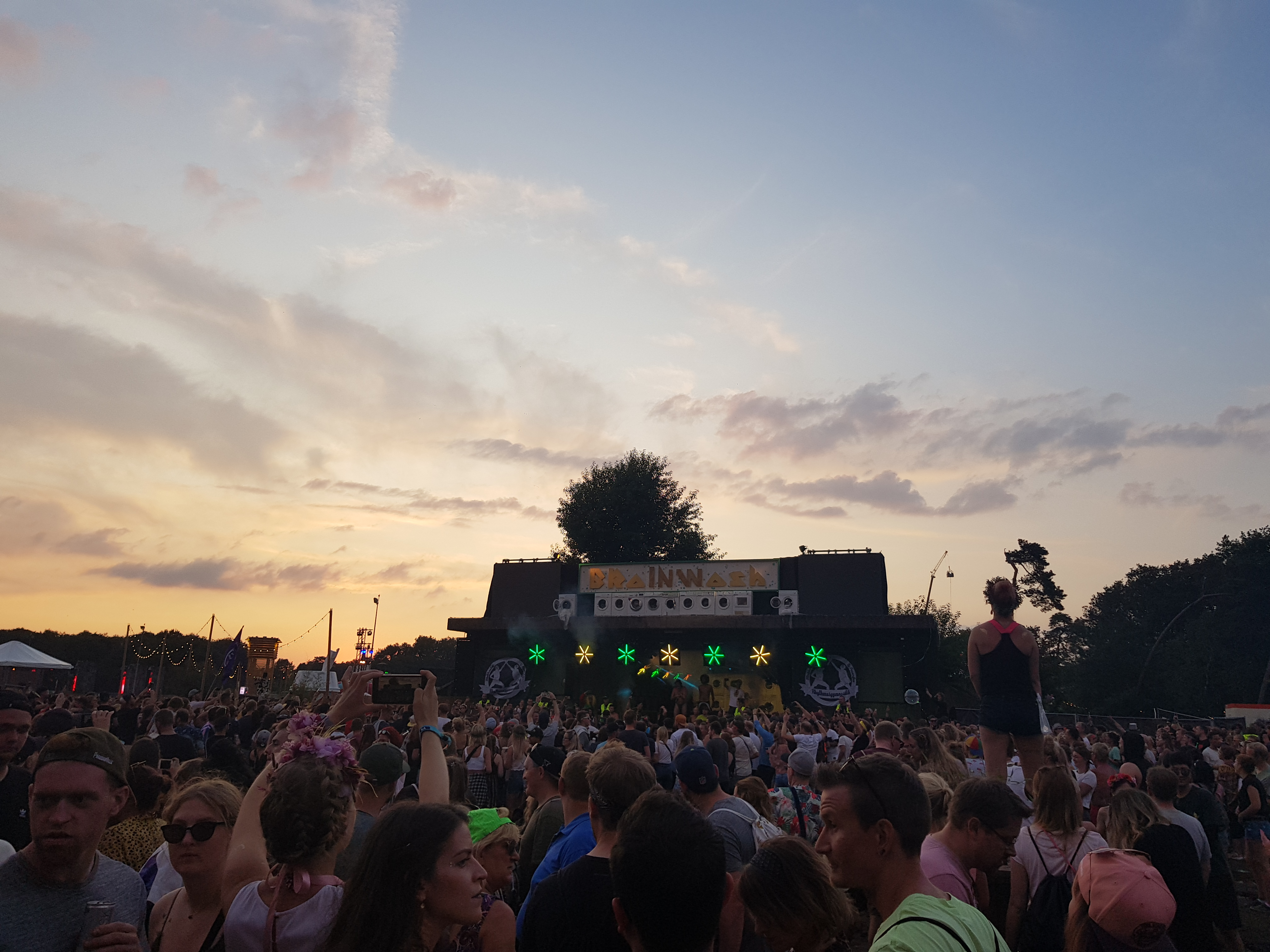 Brain Wash Parookaville 2019